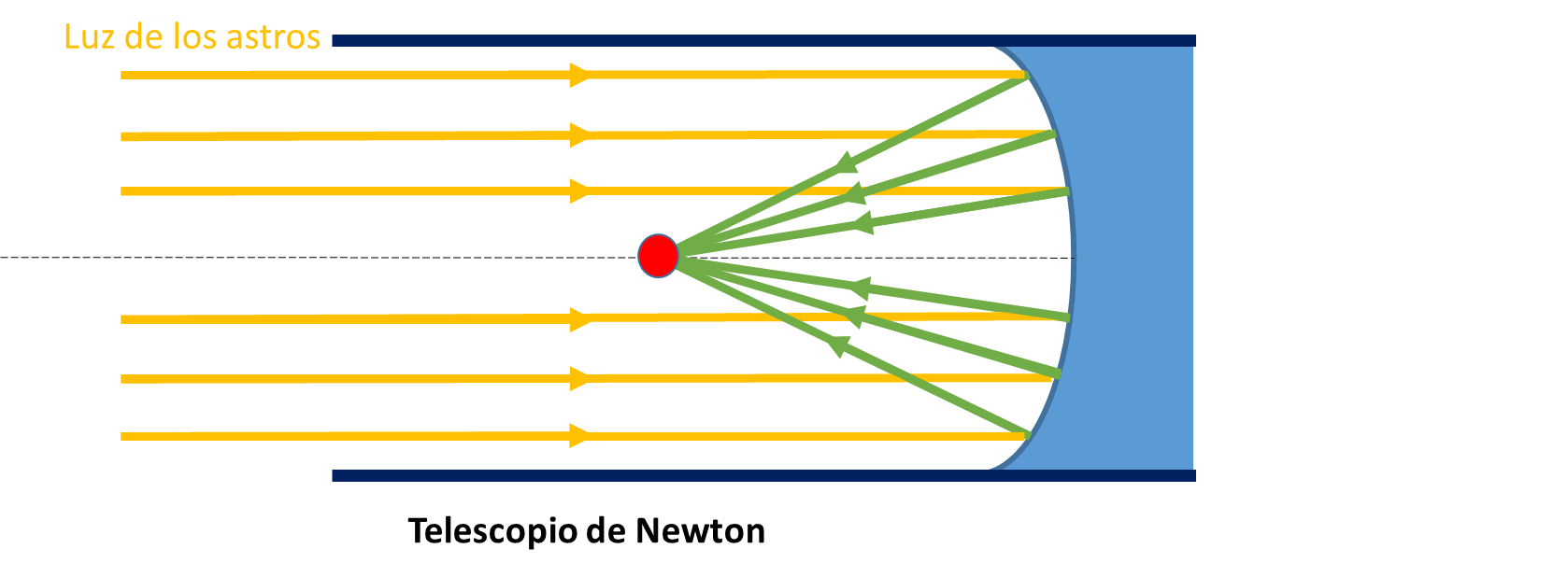 Principio del funcionamiento del telescopio de Newton